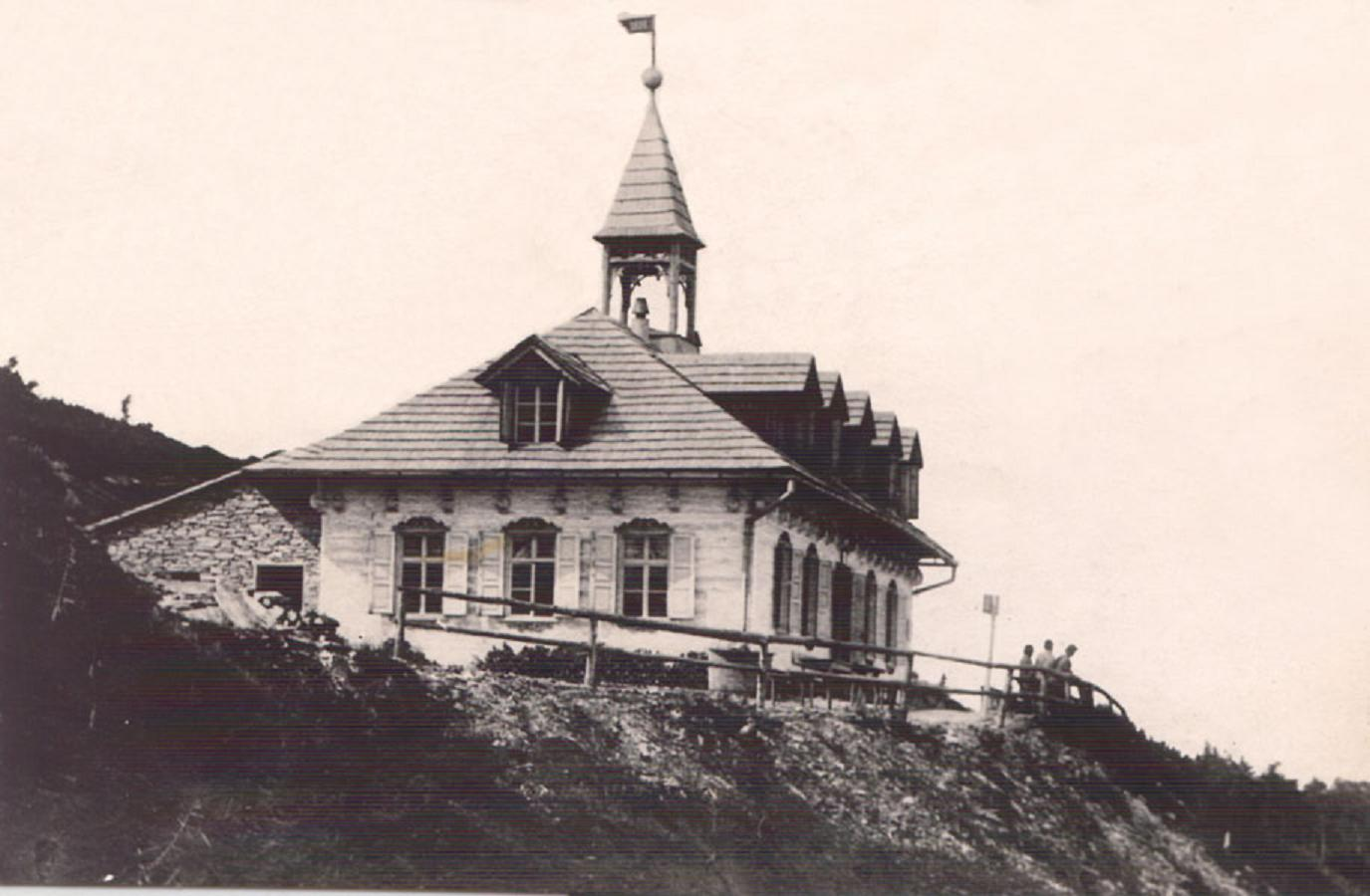 Historyczne zdjęcie (Chata Jiřího na Šeráku)